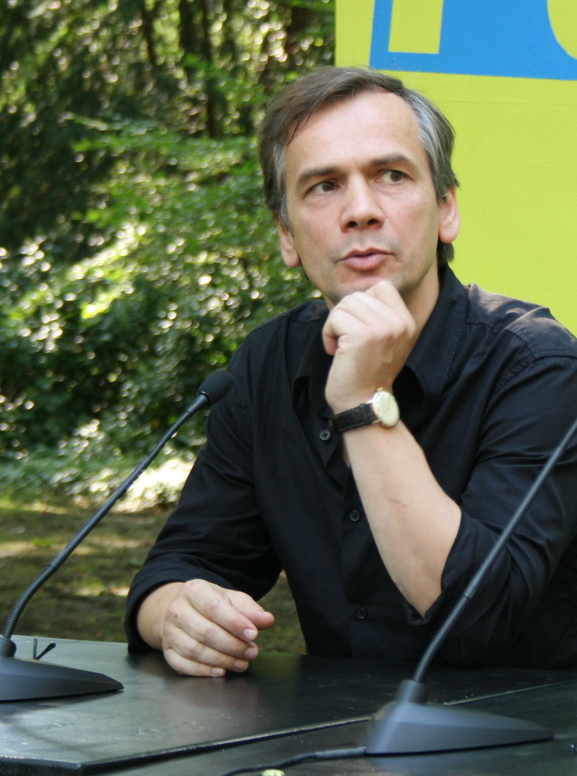 Lutz Seiler auf dem Poetenfest Erlangen im August 2007